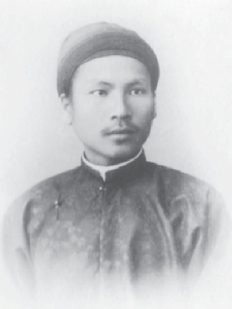 Vua Hàm Nghi những năm đầu ở chốn lưu đày. Ảnh TL của Amandine cấp cho NĐX